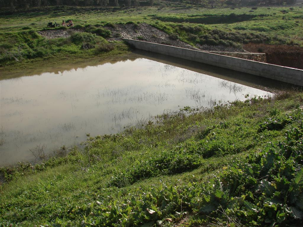 הסכר בנחל אדוריים